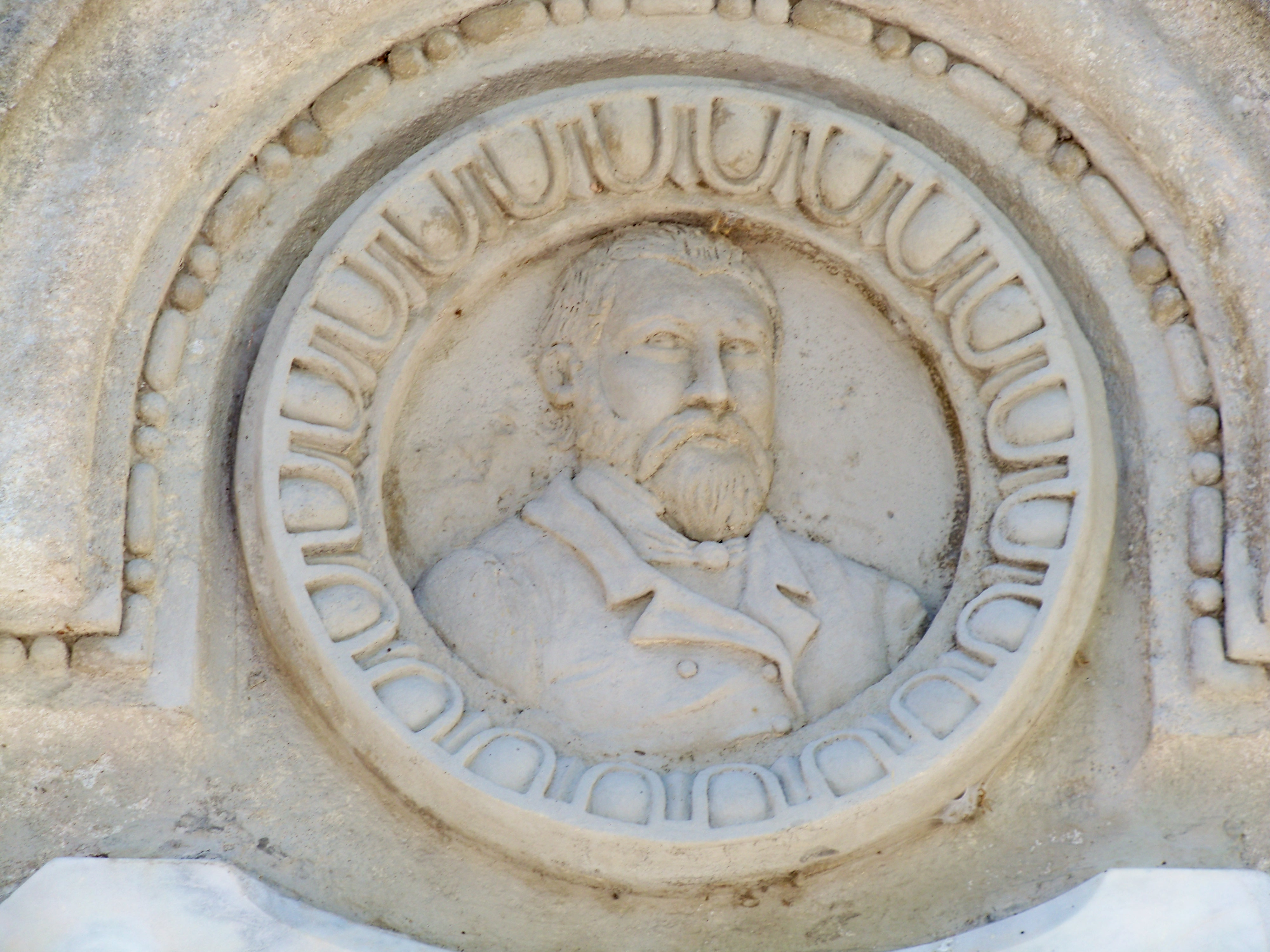 portrait d'Elzéar Pin, sur une fontaine à son nom à Apt, Vaucluse, France